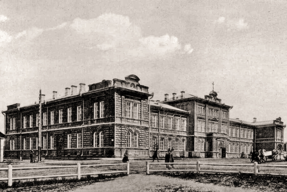 Immagine storica del liceo di Tomsk